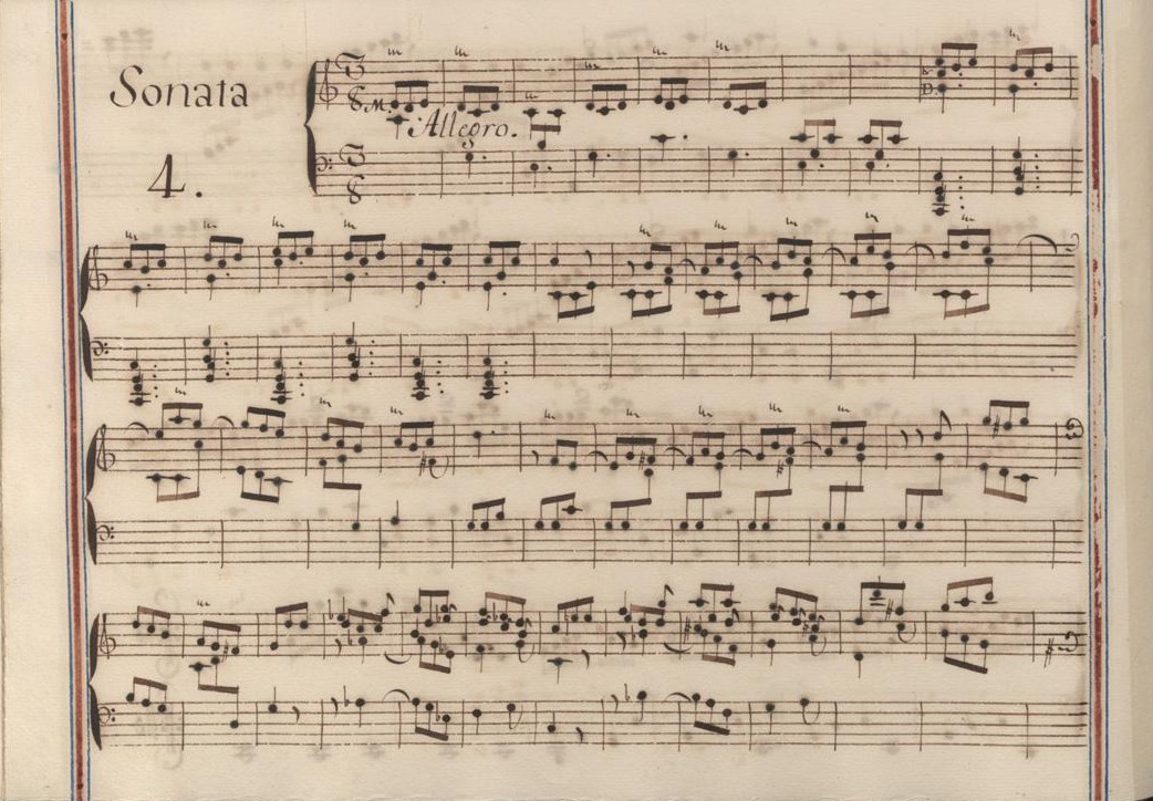 La sonate K. 487, telle qu'elle se présente dans le manuscrit de Venise, volume XII no. 4.